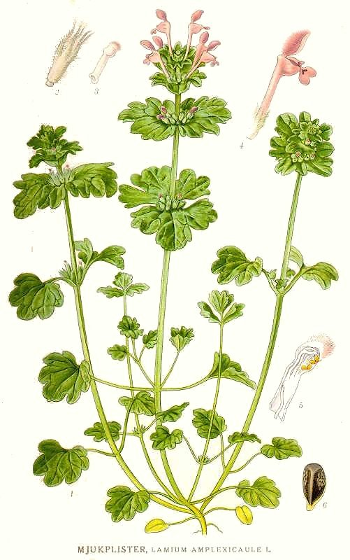 Original Description Mjukplister, Lamium amplexicaule L.